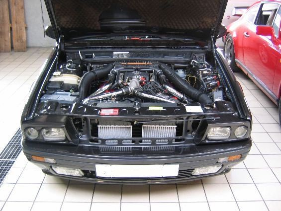 Moteur Maserati Racing